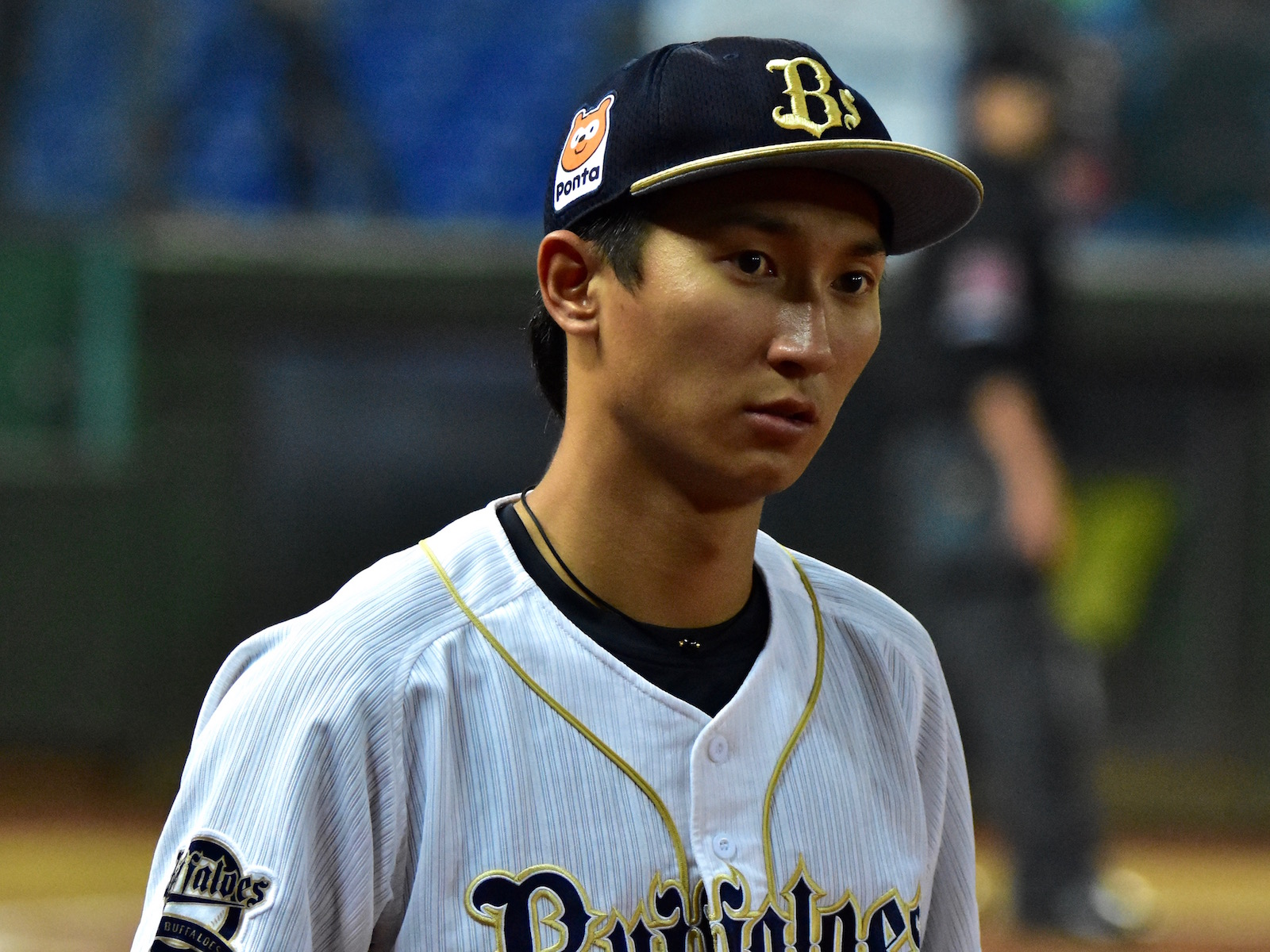 2016年12月17日台中インターコンチネンタル野球場にて